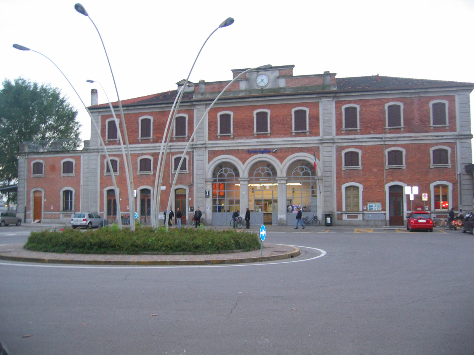 Facciata d'ingresso della stazione di Treviglio